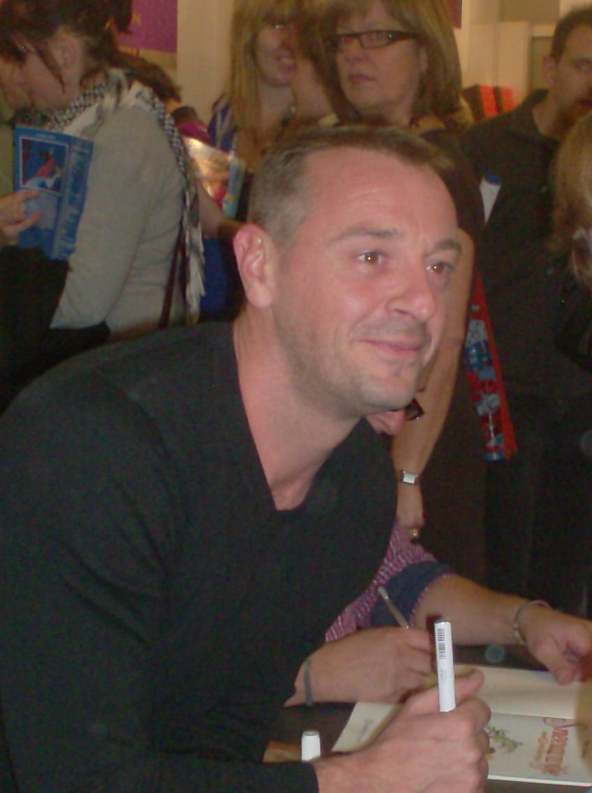 Foto van Tom Waes op de Boekenbeurs 2010